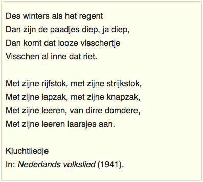 Volksliedje 'Des winters als het regent' (ook wel met de titel 'Het loze vissertje'), liedtekst. Tekst zoals opgetekend in Pollmann en Tiggers (1941). Oudste vindplaats: ca. 1640.